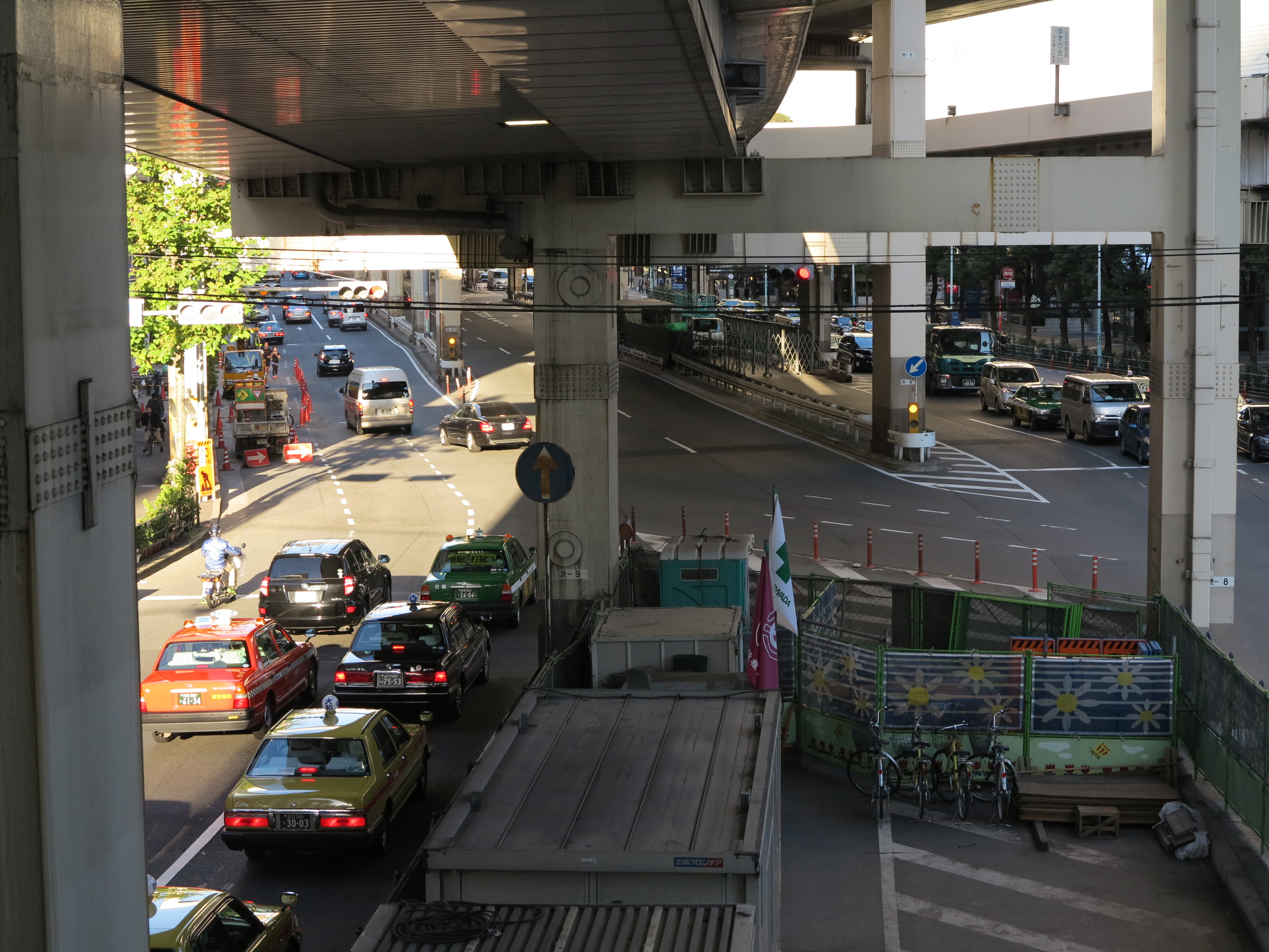 港区六本木の六本木二丁目交差点